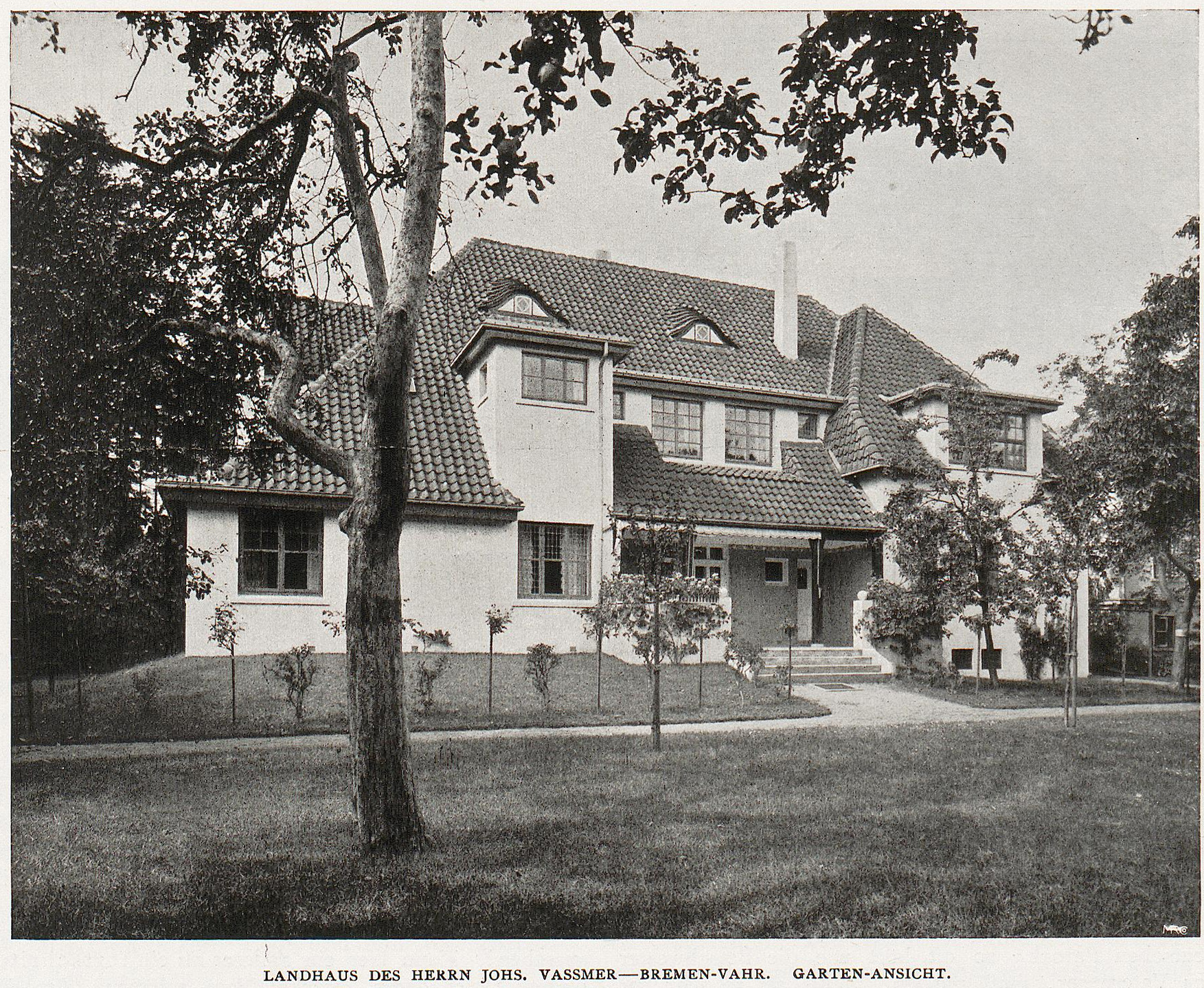 Landhaus Johs. Vassmer, Bremen, Horner Heerstraße 19, 1907 von Runge & Scotland